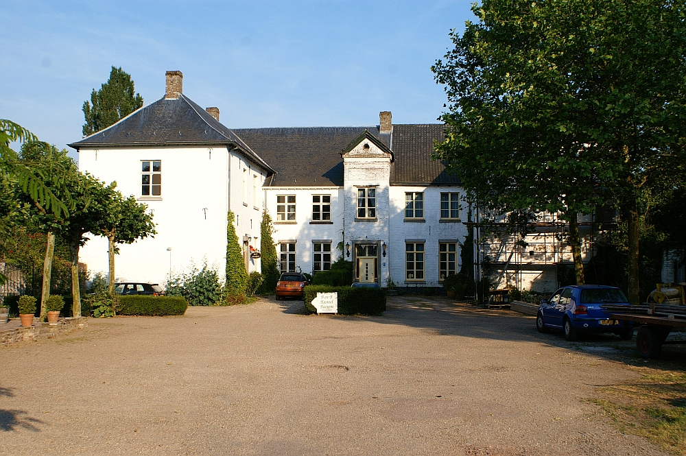 Kasteel Baexem te Baexem.